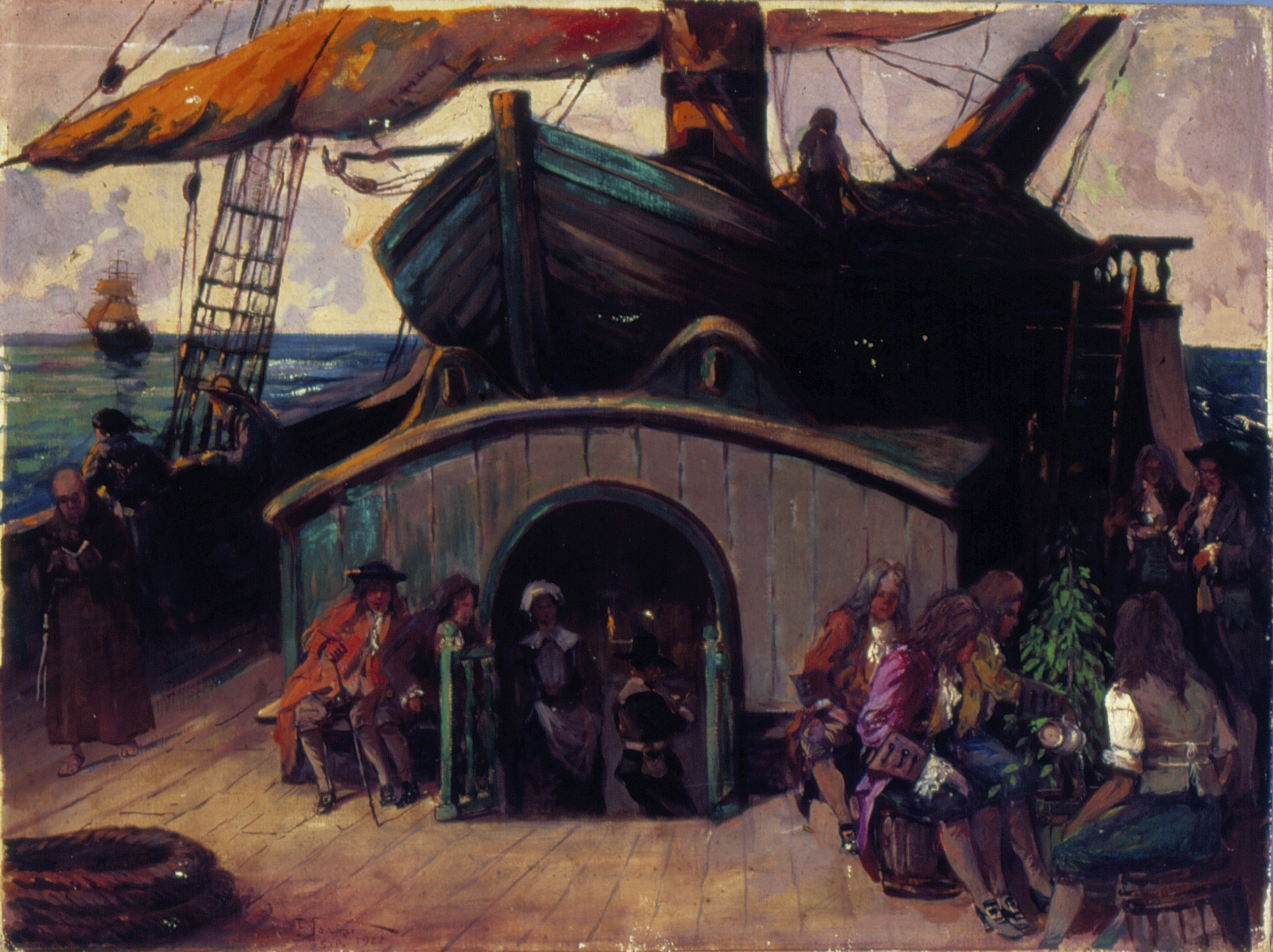 Obra que integra o acervo do Museu Paulista da USP. Coleção Fundo Museu Paulista - FMP